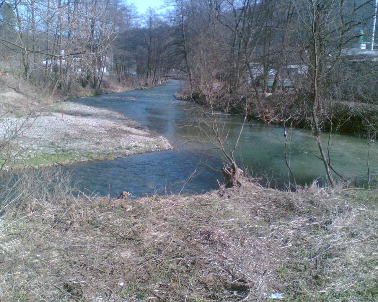 Česky: Soutok Březná-Moravská Sázava